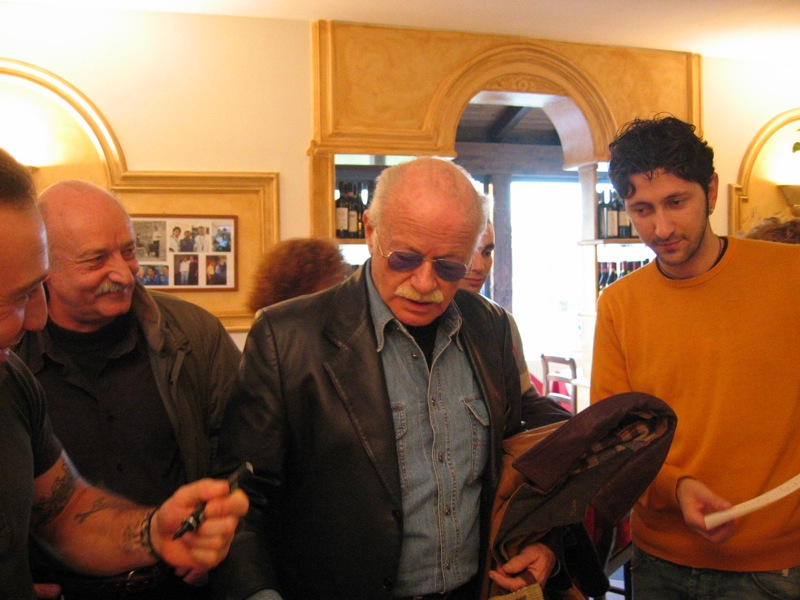 Una volta ho lavorato al sito di Gino Paoli, e ho pranzato con lui e i suoi fans in un noto ristorante di Modena.